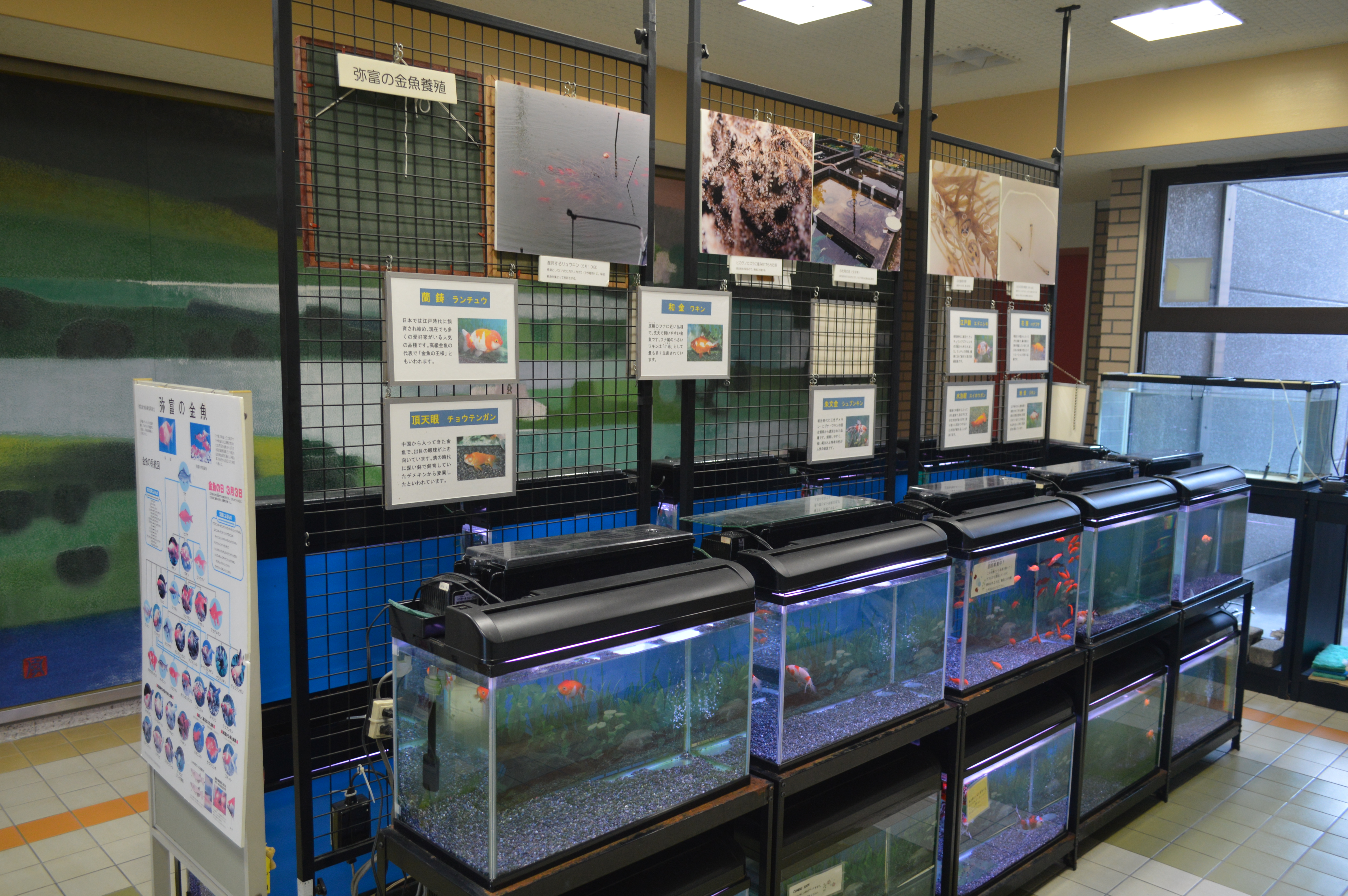 愛知県弥富市にある弥富市歴史民俗資料館。弥富金魚の水槽。